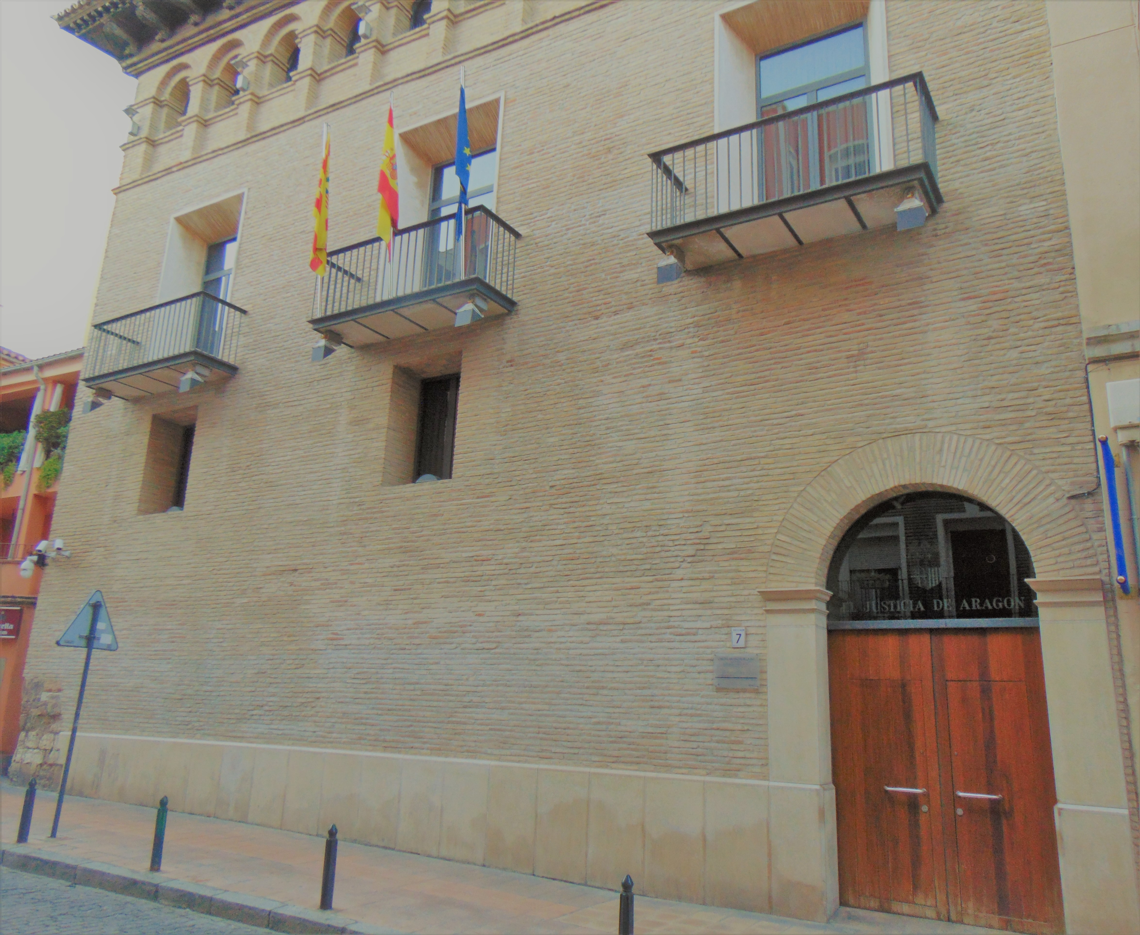 Casa Armijo. Casa-palacio del siglo XVI, actual sede del Justicia de Aragón (Zaragoza).